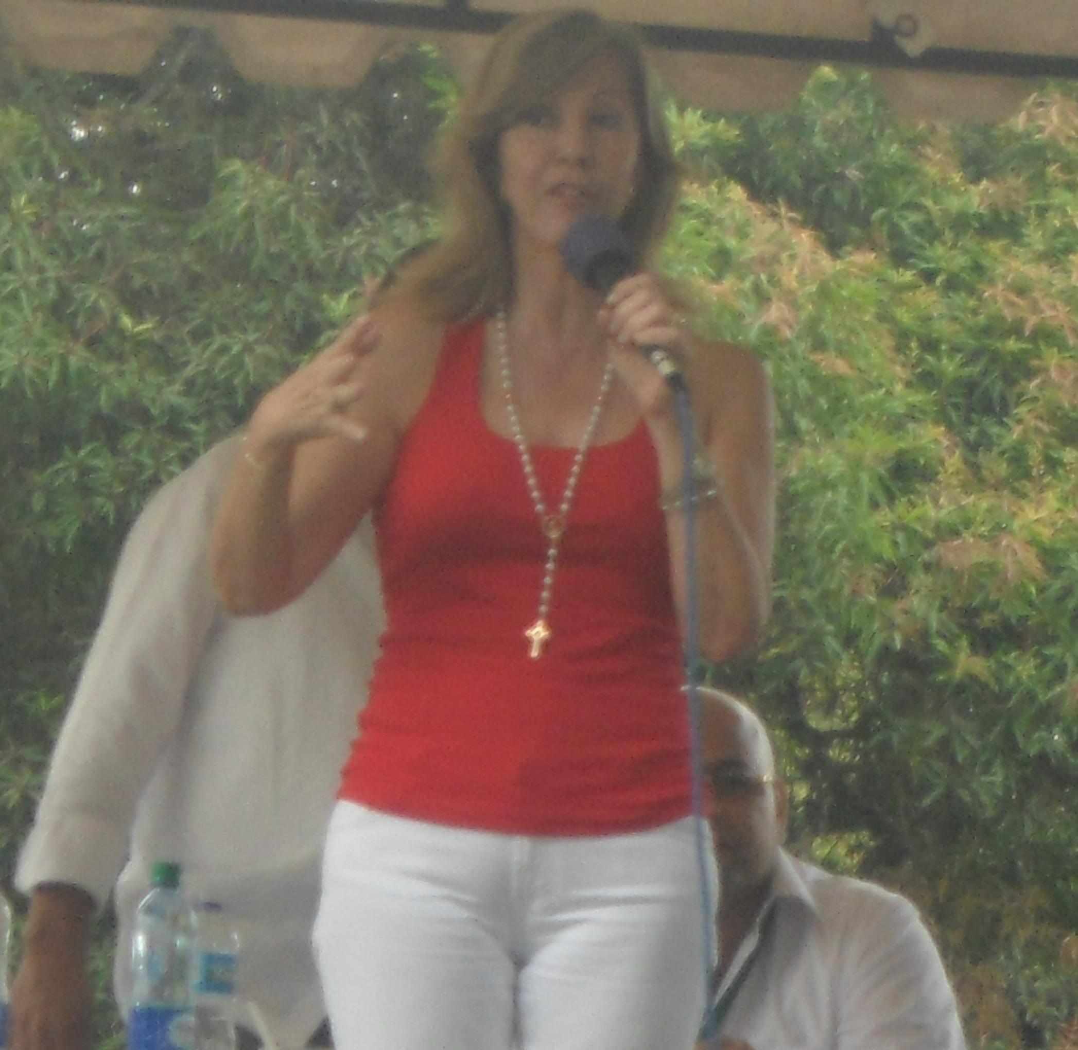 en reunion en el municipio de Jamundi Valle del cauca, villapyme